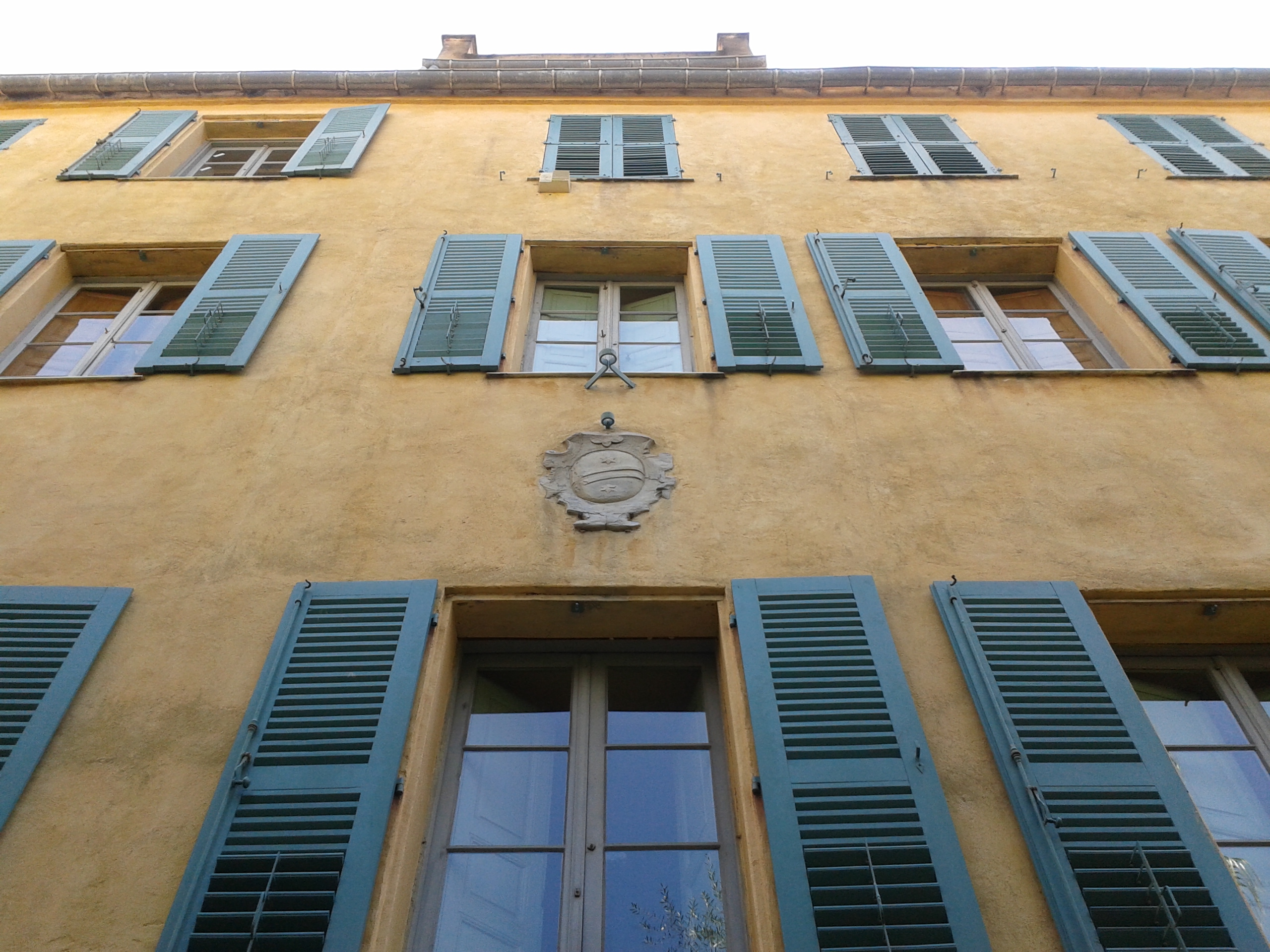 Musée de la maison Bonaparte en 2014.